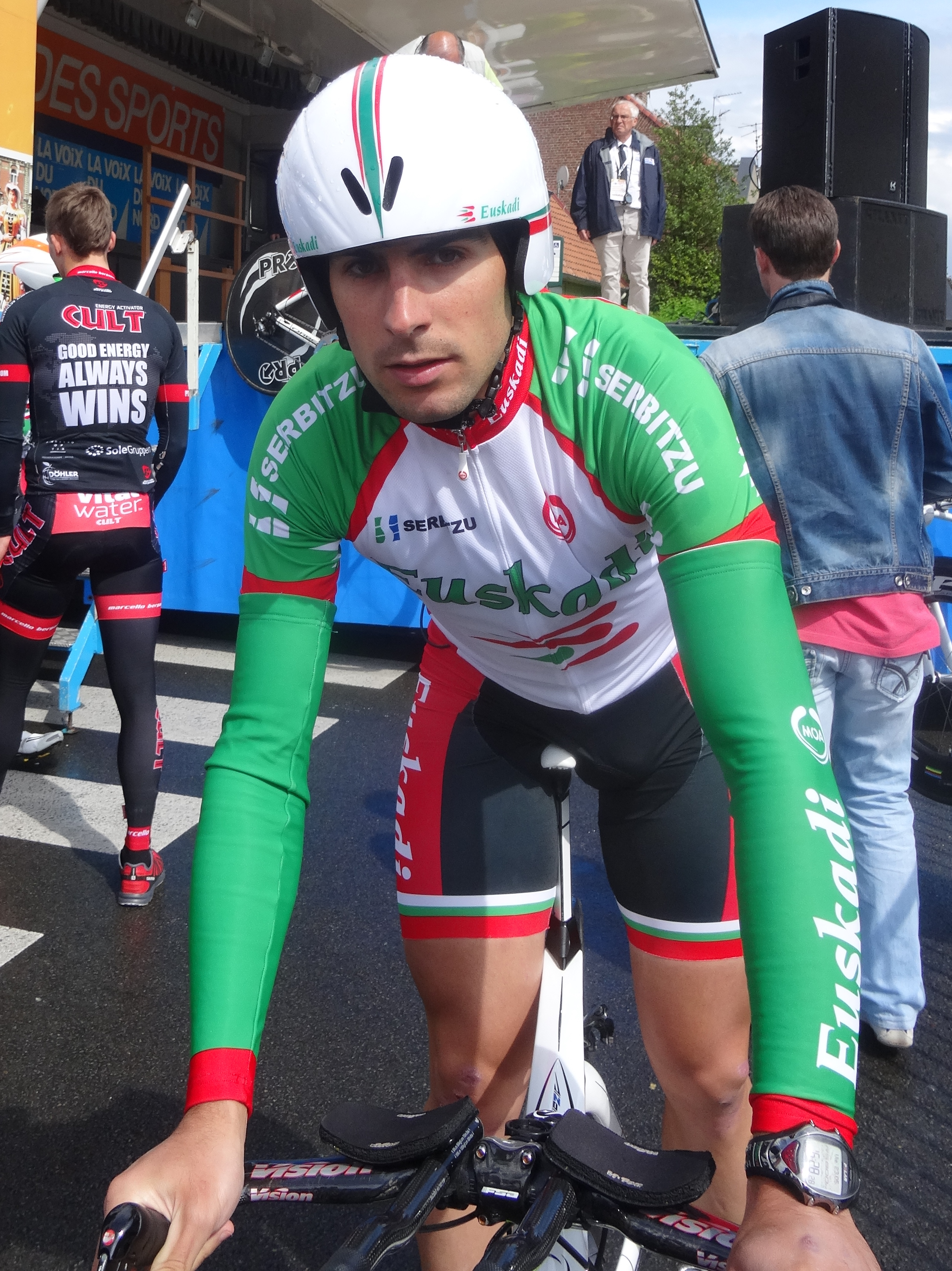 Reportage photographique réalisé le vendredi 23 mai 2014 à l'occasion du départ de la première étape du Paris-Arras Tour 2014 à Lens, Pas-de-Calais, Nord-Pas-de-Calais, France. Depicted person: Miguel Mínguez